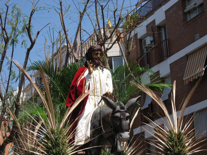 La imagen corresponde a la Entrada en Jerusalén de Nuestro Señor a lomos de la borrica en la Procesión del Domingo de Ramos en Santa Coloma de Gramanet